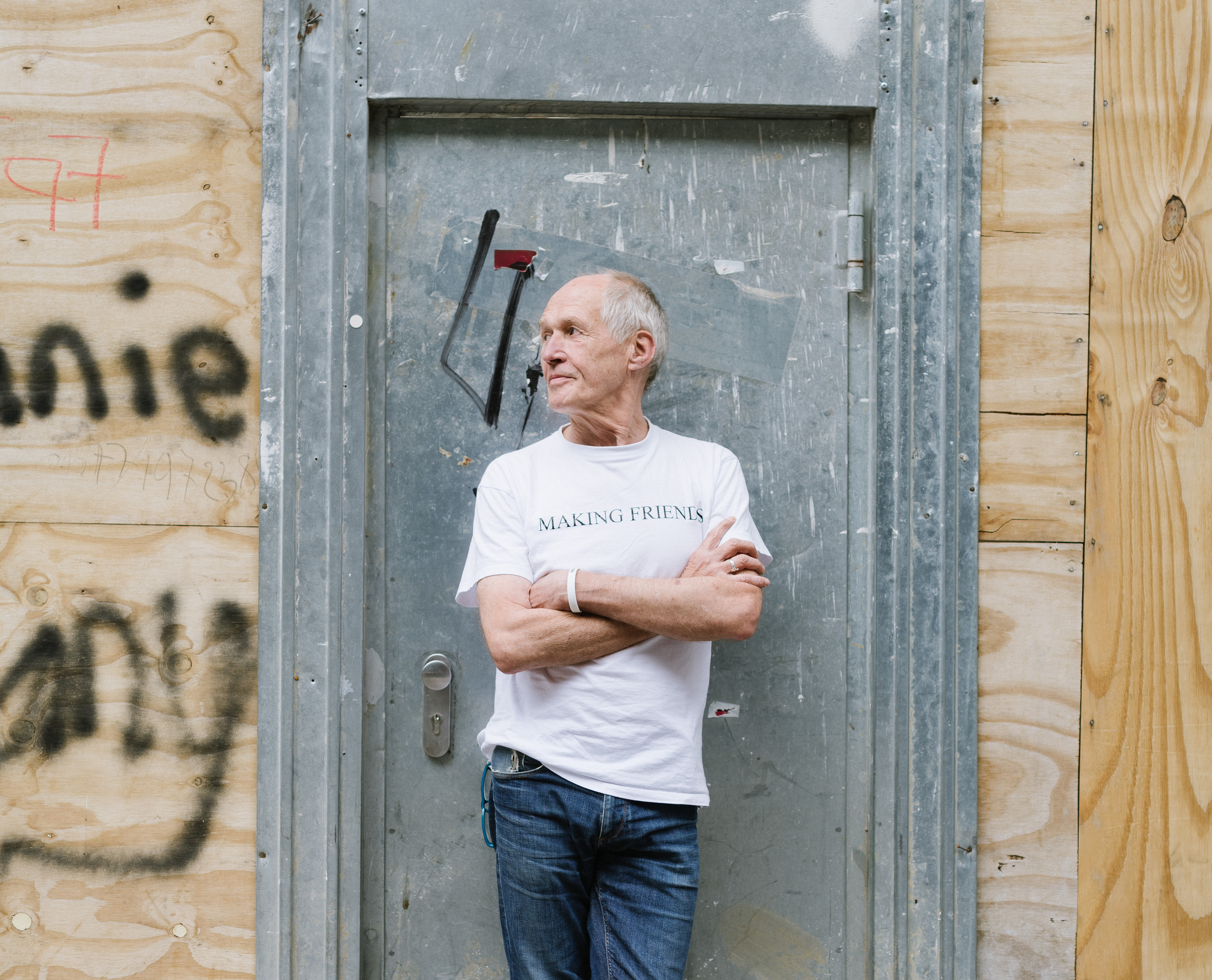 Oskar Mahler vor der Baustelle Kaiserpassage im Frankfurter Bahnhofsviertel